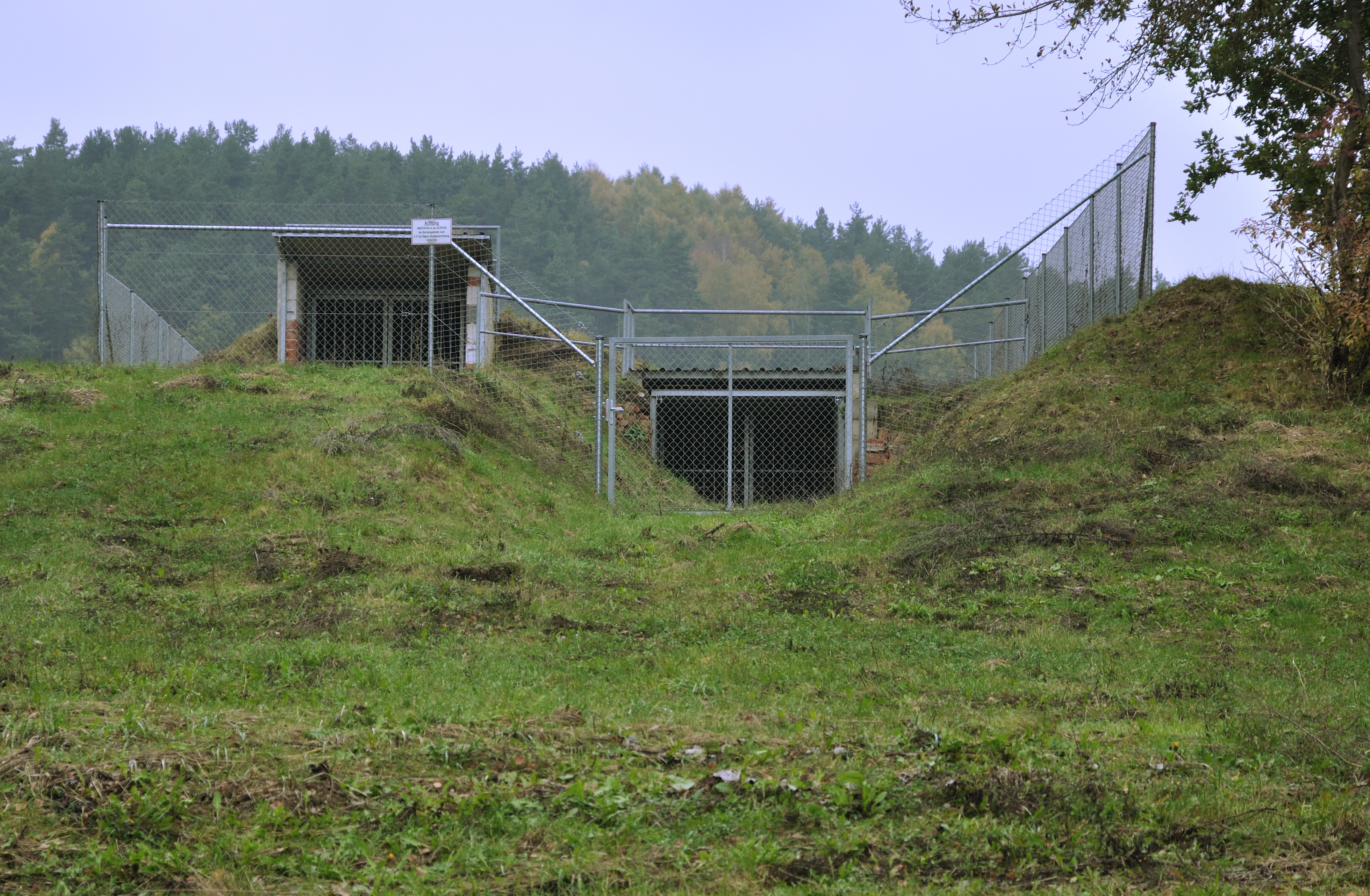 Zugang zur Tongrube Monika, Hirschau-Ehenfeld